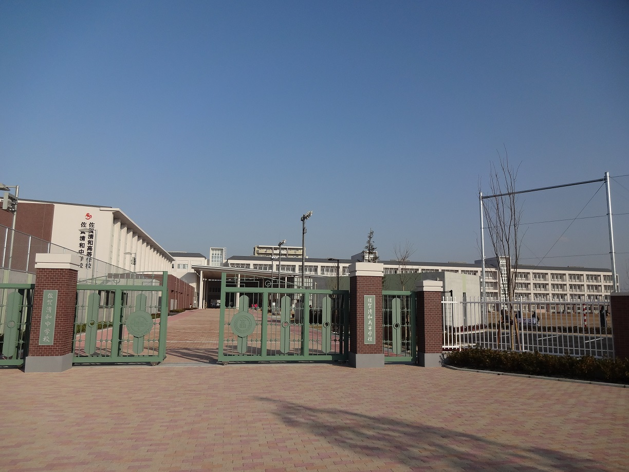 正門の様子です